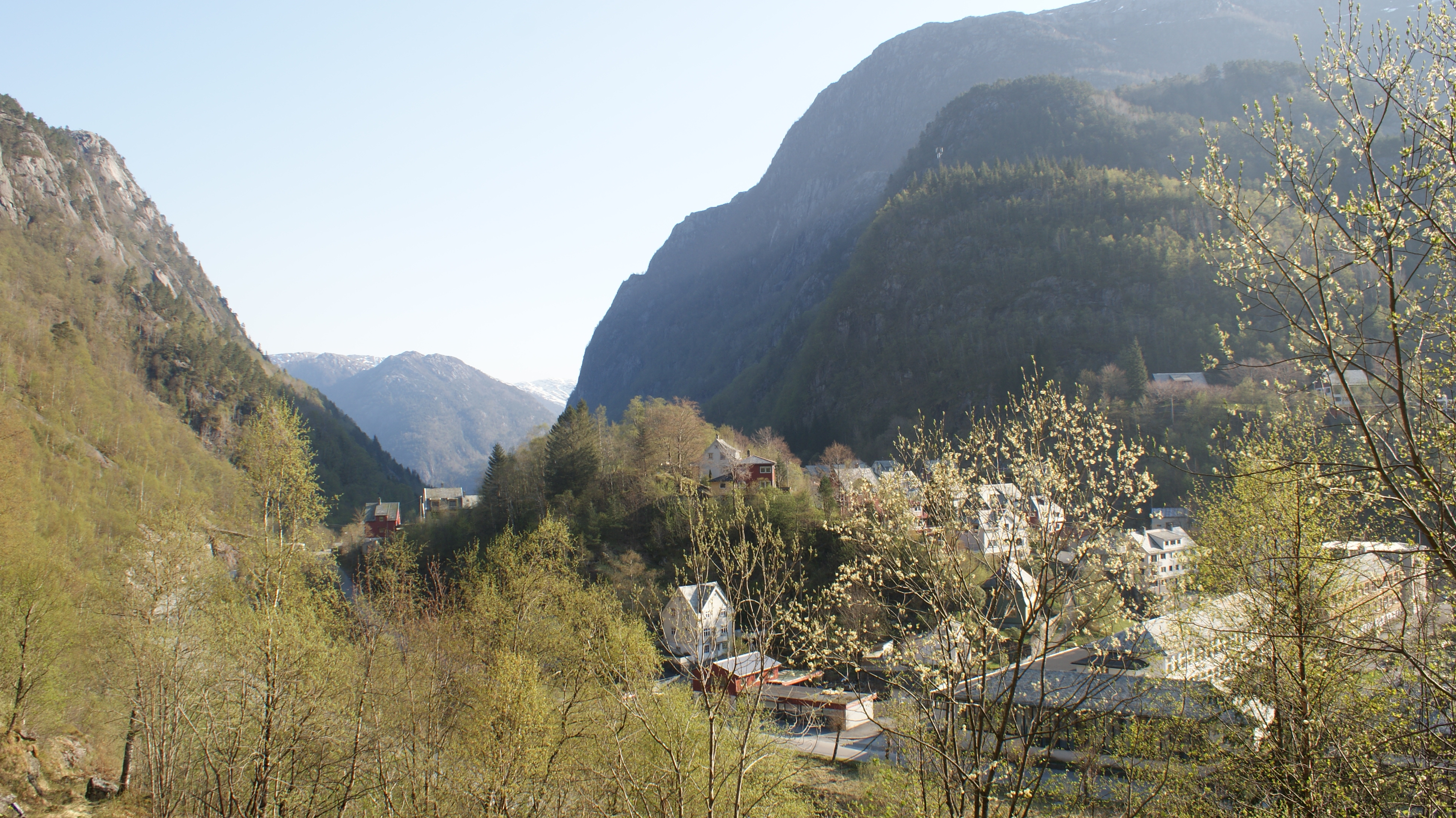 Dale, Hordaland, Norway.